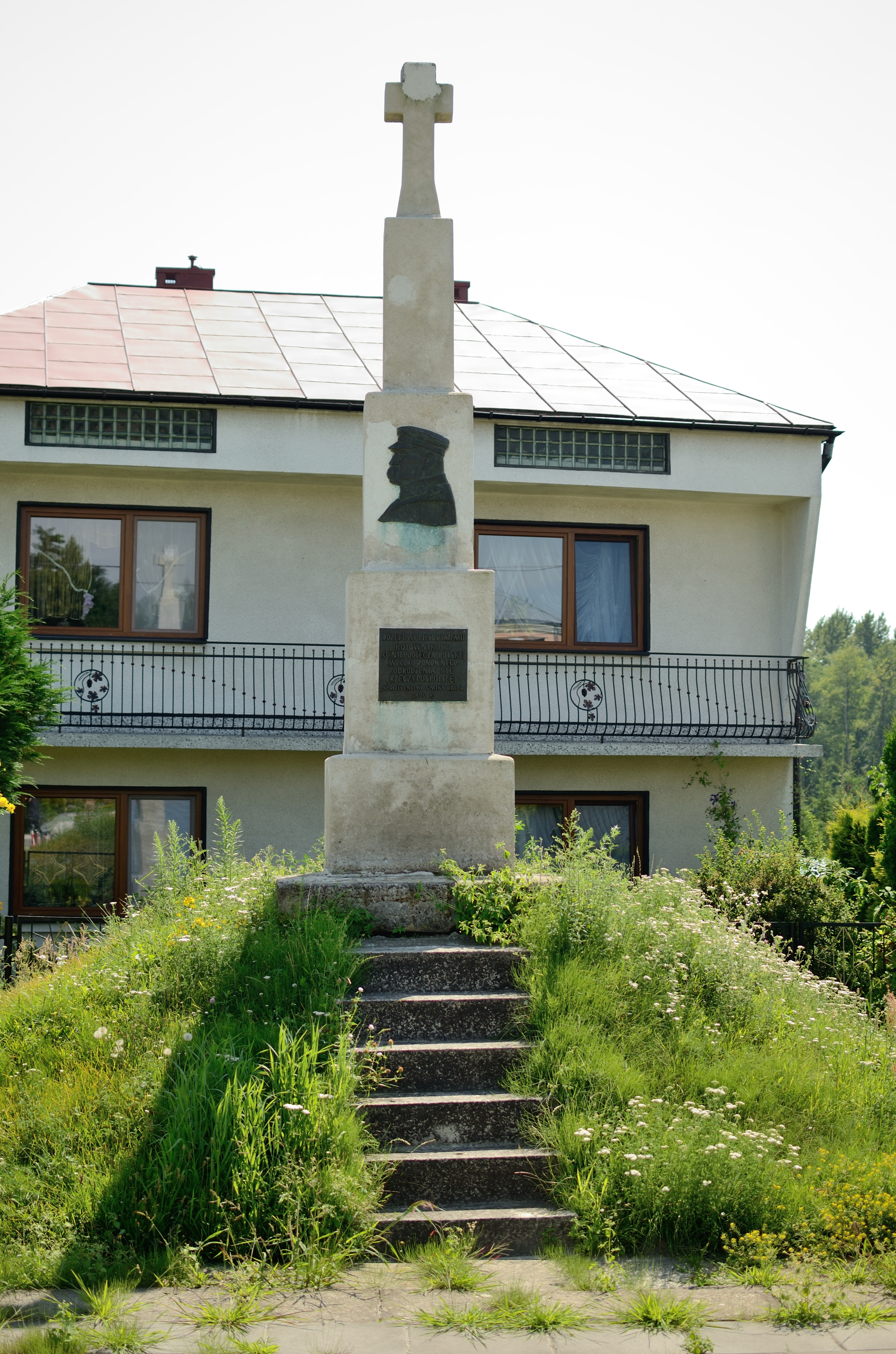 Pomnik w hołdzie Józefowi Piłsudzkiemu 1990r.